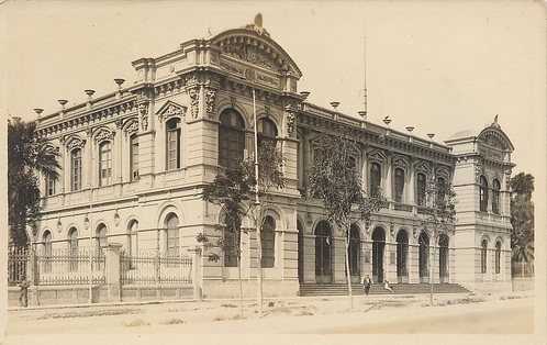 Fachada del local de la Facultad de Medicina "San Fernando" de la Universidad Nacional Mayor de San Marcos; Lima, Perú; 1920s.